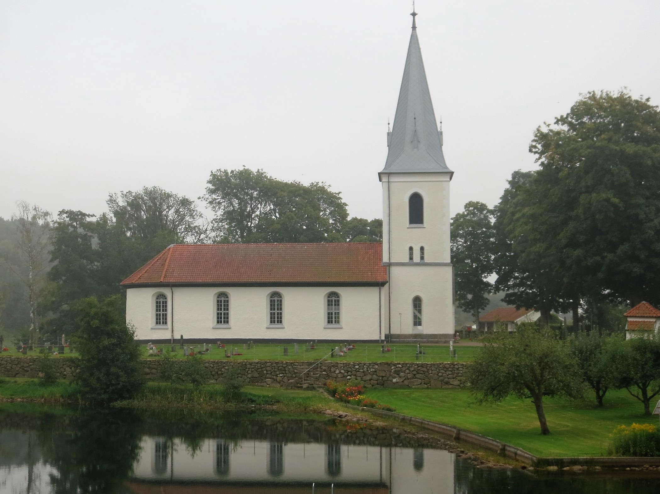 Skällinge kyrka i Halland